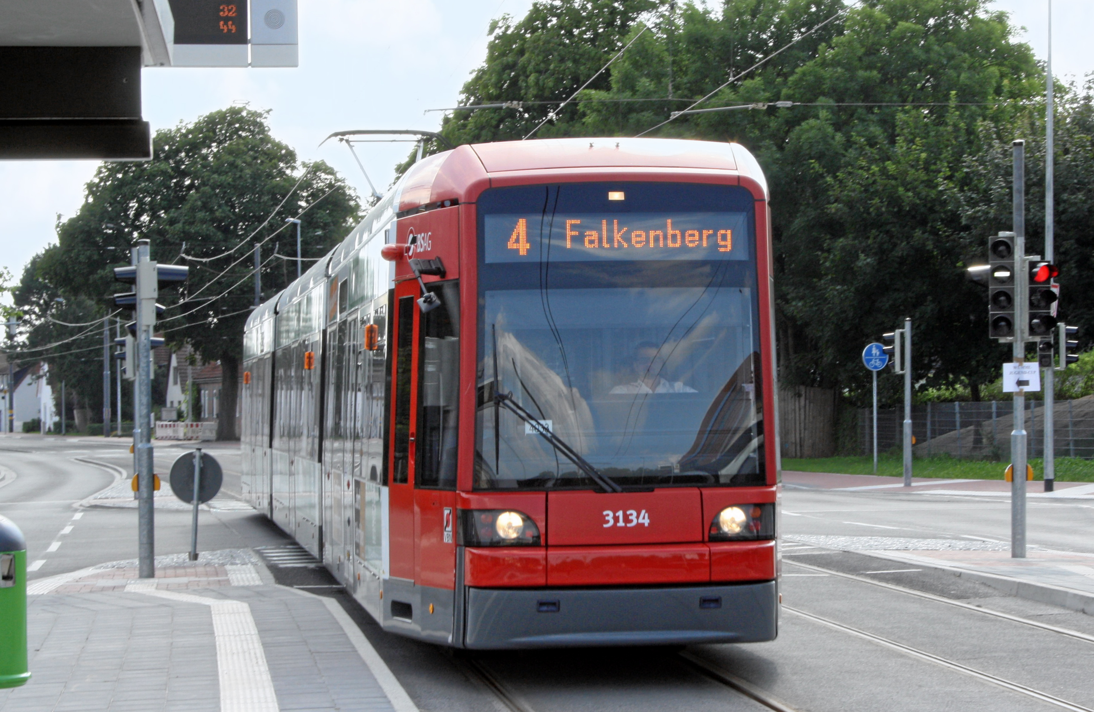 Die Erweiterung der Straßenbahn 4 nach Lilienthal-Falkenberg wurde am 1.8.2014 in Betrieb genommen. Eine der ersten Straßenbahnen Richtung Falkenberg bei der Einfahrt in Haltestelle Schoofmoor.